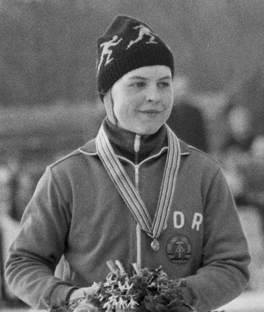 Europese kampioenschappen schaatsen voor dames in Heerenveen. Gabi Schönbrunn (Oost-Duitsland, tweede) tijdens de huldiging